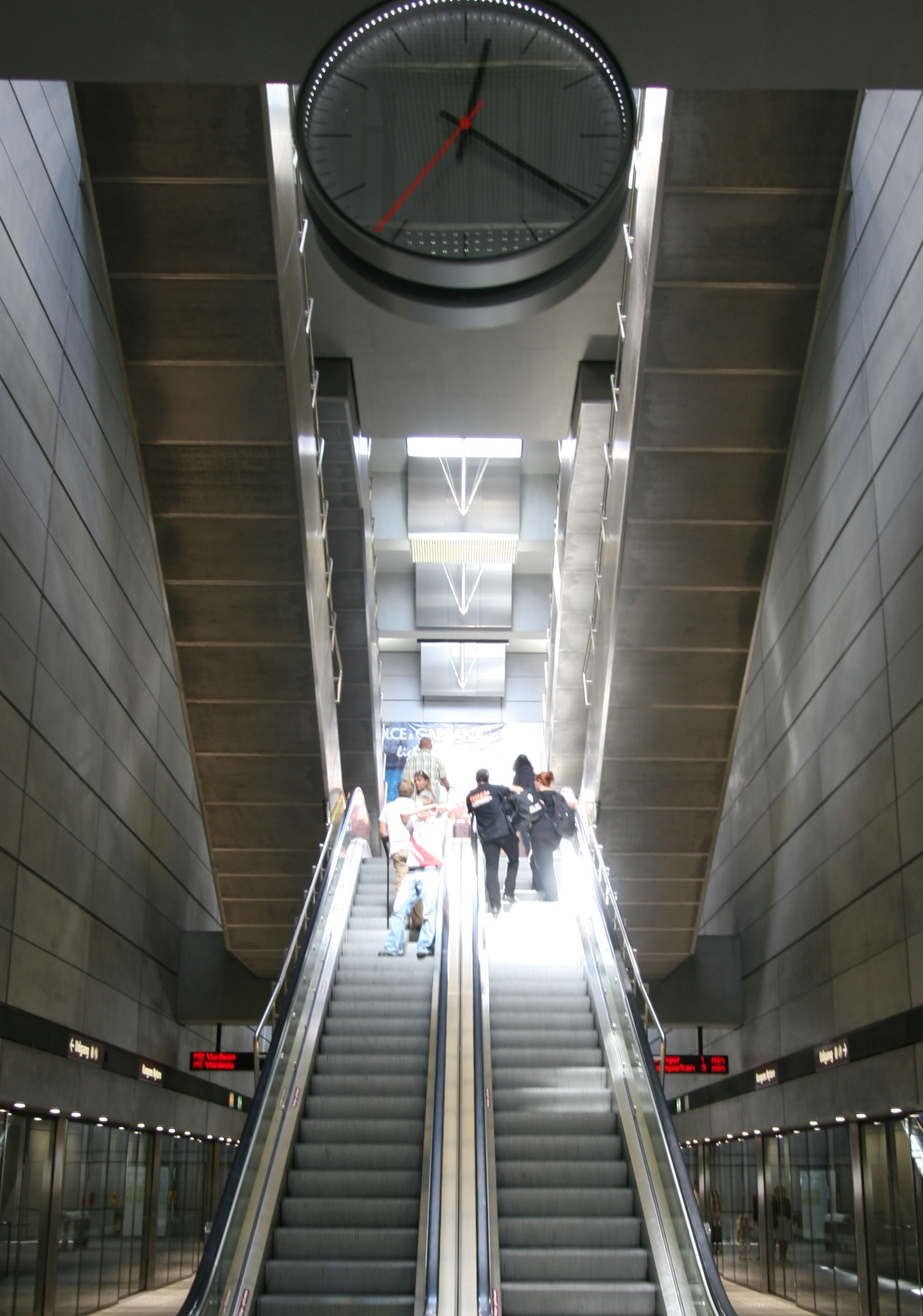 Copenhagen Metro Kogens Nytorv station